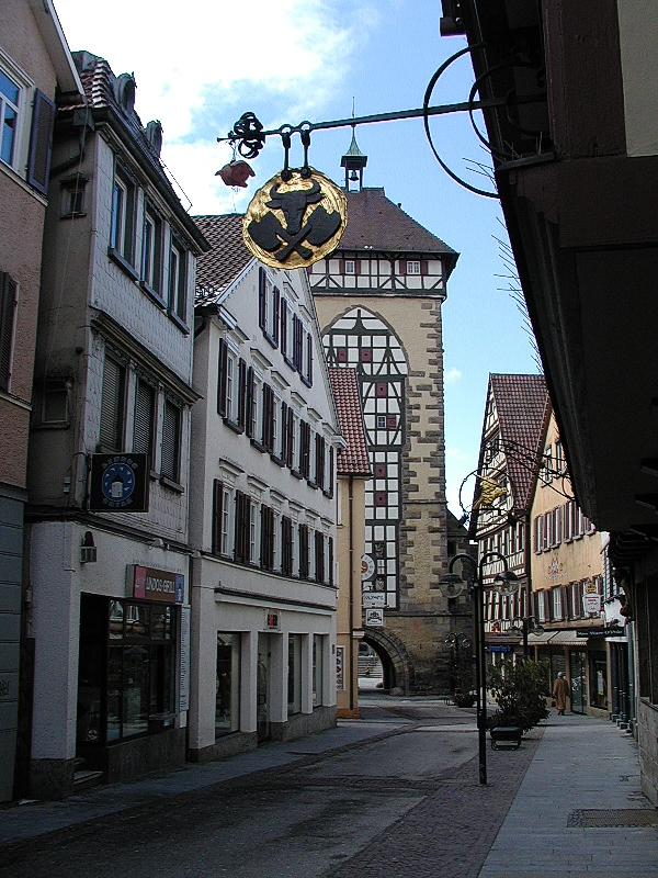 Bilder aus Reutlingen, Tübinger Tor